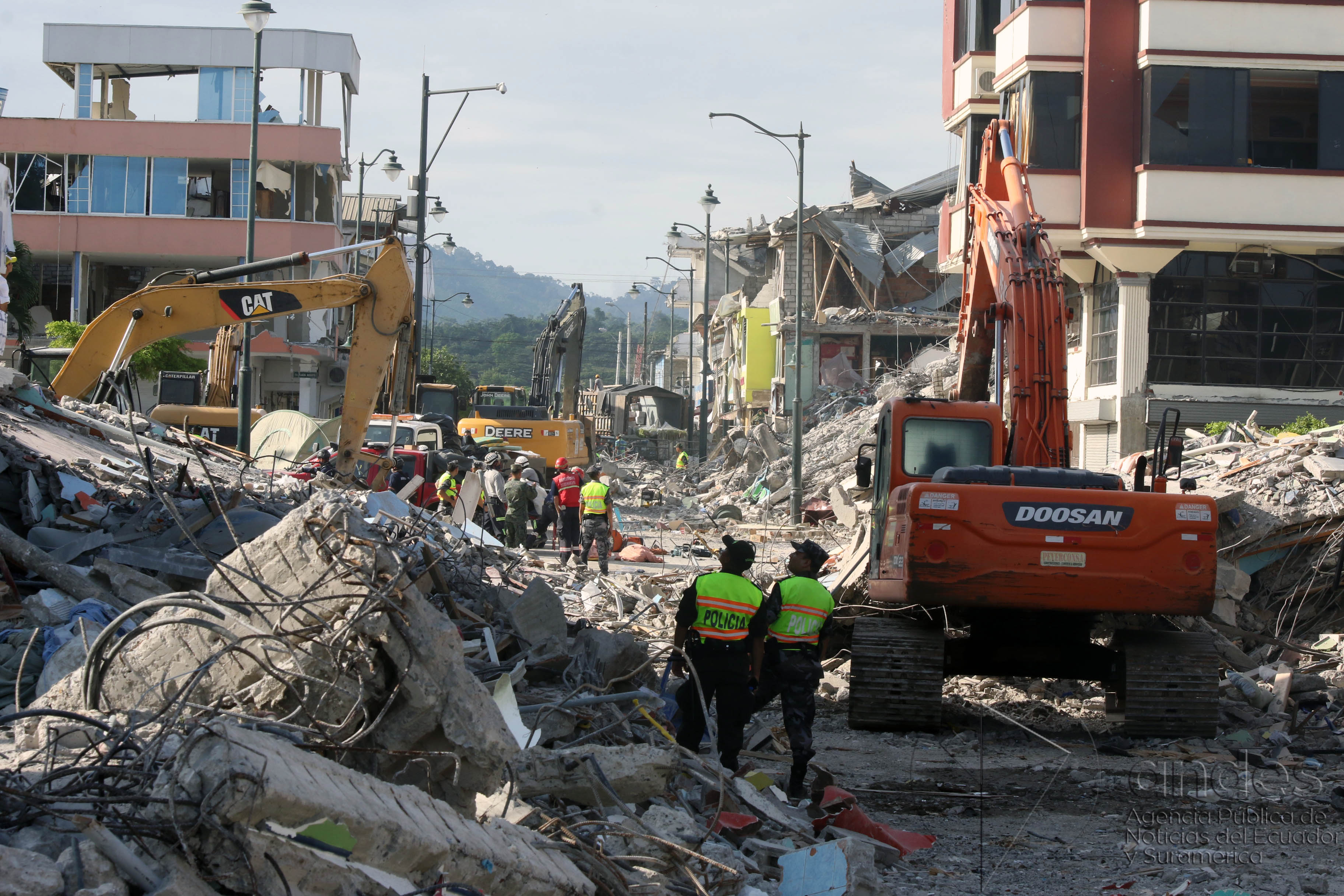 Pedernales, (Manabí) 18 abr (Andes).- Un devastador terremoto asotó al cantón Pedernales, causa de ello la población está sin suministro eléctrico y agua potable. La Policía, Cruz Roja, Bomberos, Ejército, Médicos, Paramédicos y varios grupos de voluntarios trabajan en labores de rescate y asistencia a los damnificados. ANDES/Micaela Ayala V.